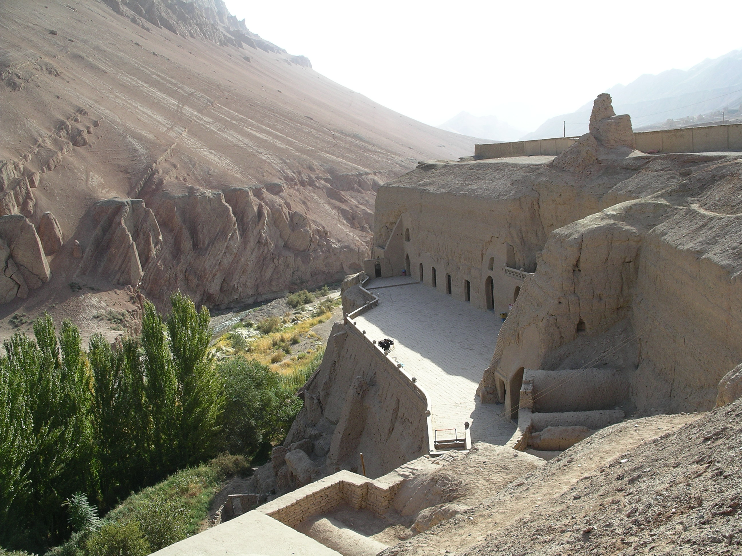 Bezeklik caves (near Turpan), Xinjiang, China